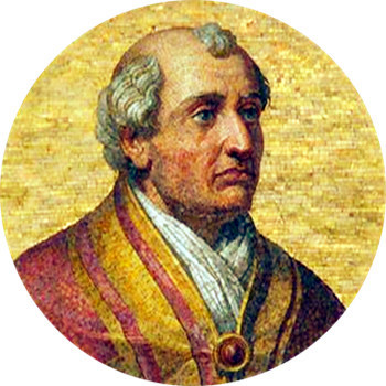 Papież Benedykt VIII wizerunek w bazylice San Paolo fuori le Mura w Rzymie Fotografia z niemieckiej Wikipedii